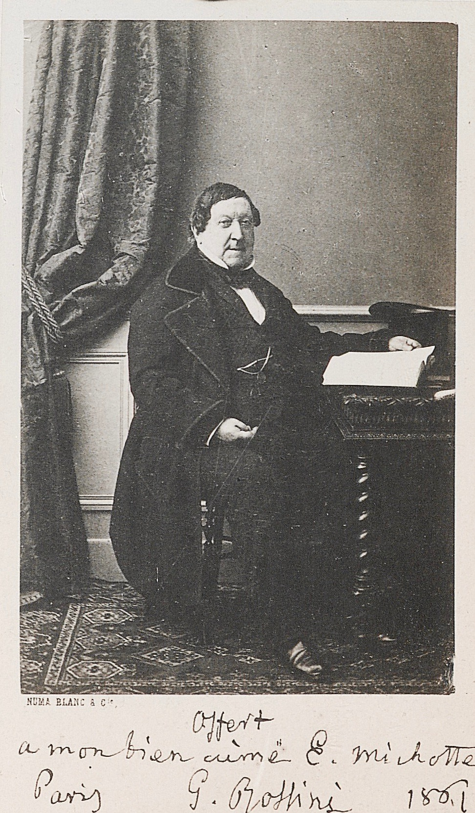 Photo de Rossini par Nadar, dédicacée à Edmond Michotte "Offert à mon bien-aimé E. Michotte", 1861 (Bibliothèque du Conservatoire royal de Bruxelles, B-Bc, FEM-932)